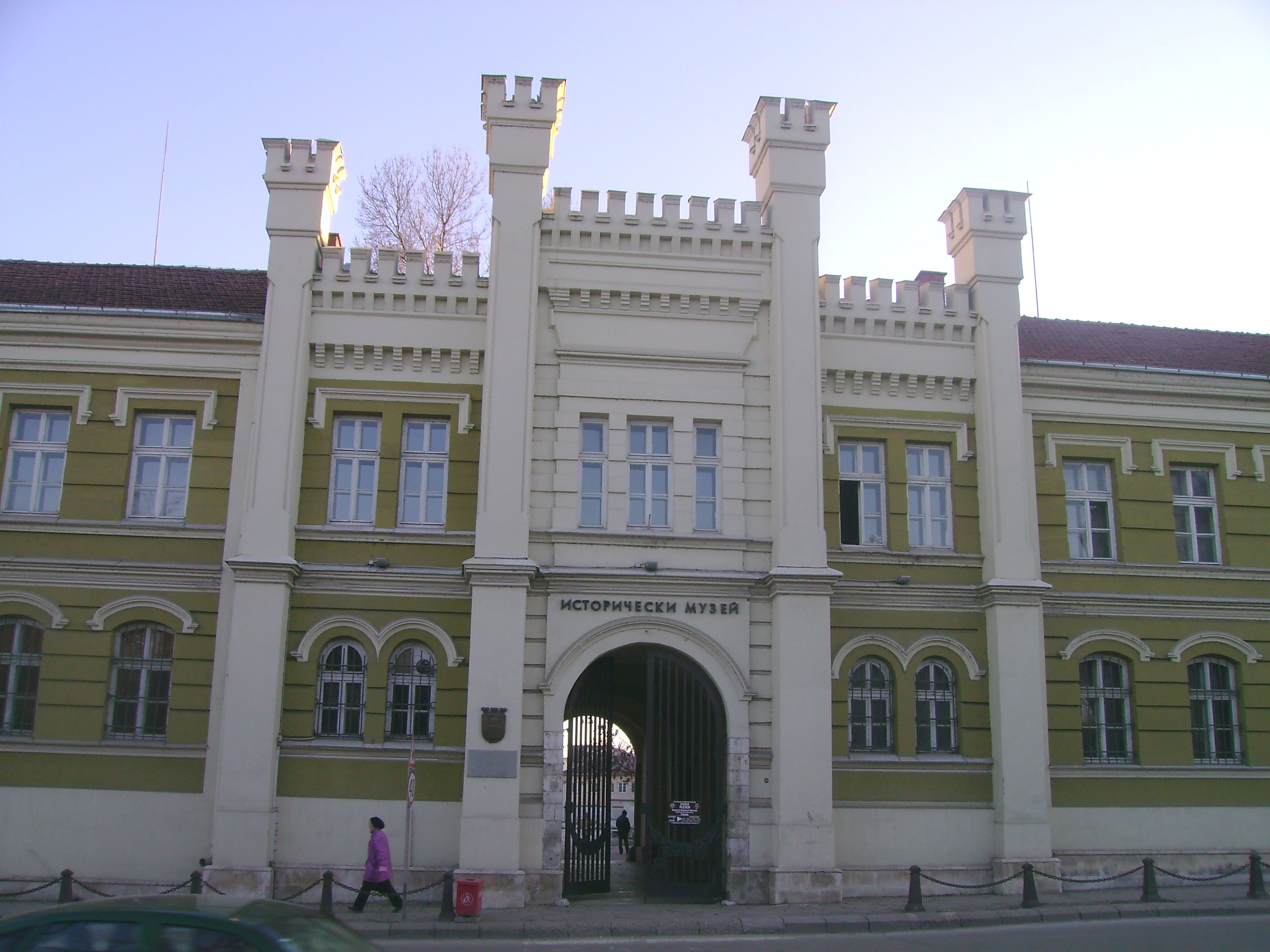 Регионален исторически музей / Regional Historical Museum